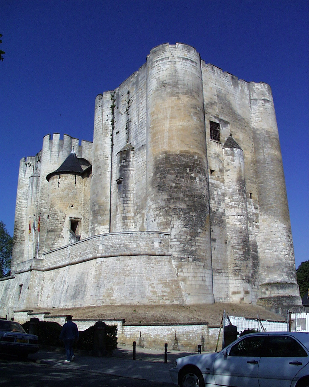 Donjon de Niort (Deux-Sèvres) Ceci est une photo personnelle prise en 2002 par --Accrochoc 11 déc 2004 à 00:16 (CET)